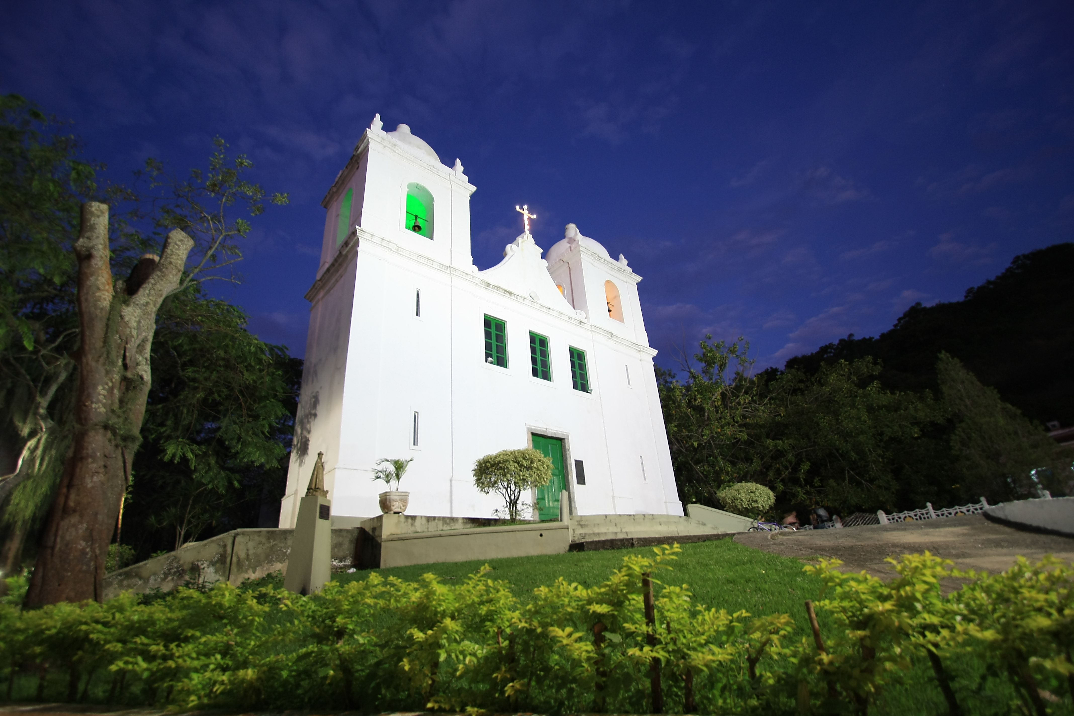 Essa igreja em Niterói data do século XVI